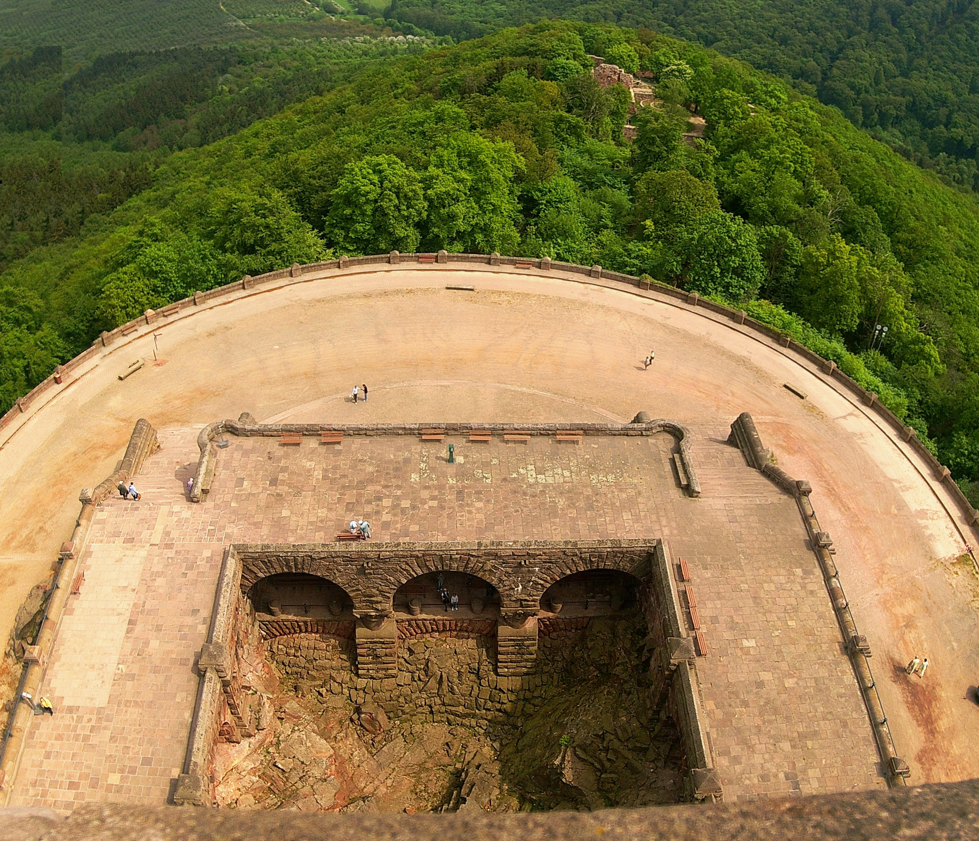 Kyffhäuserdenkmal - Blick vom Turm in die Grotte und auf die Ruine der Reichburg